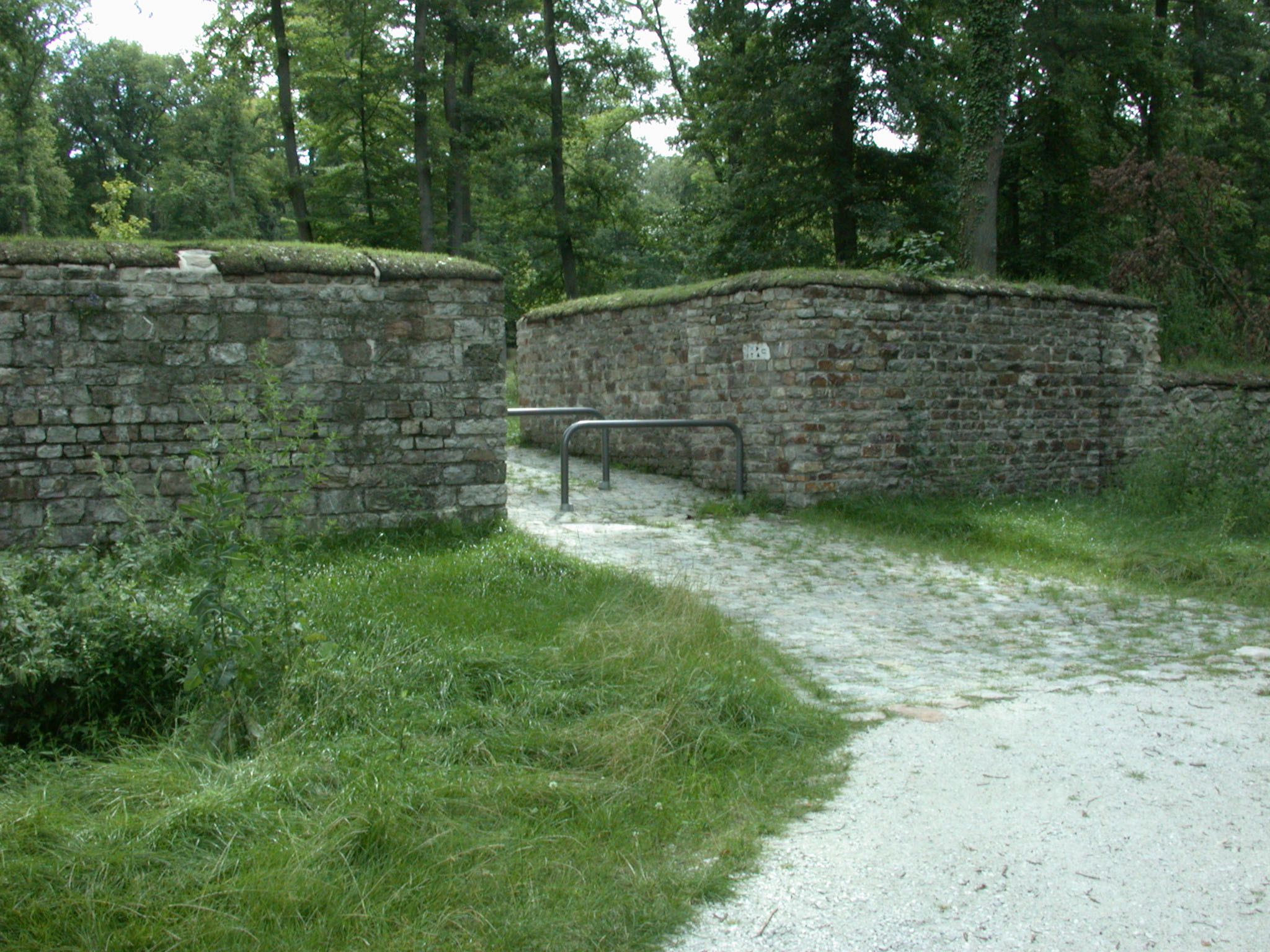 Torhaus Westtor Limeskastell Kapersburg, Wehrheim-Pfaffenwiesbach, Deutschland